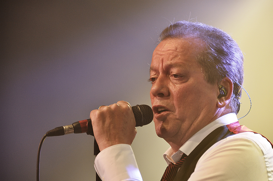 Walter Grootaers, Optreden De Kreuners in AB Brussel op 5 mei 2010